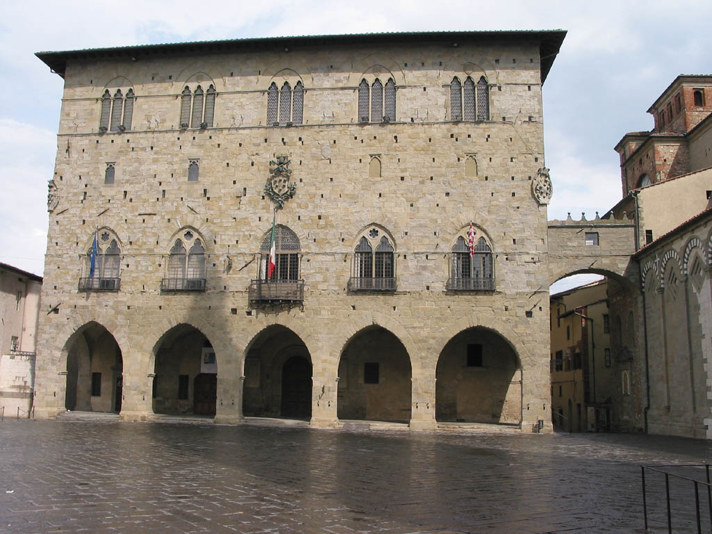 Pistoia